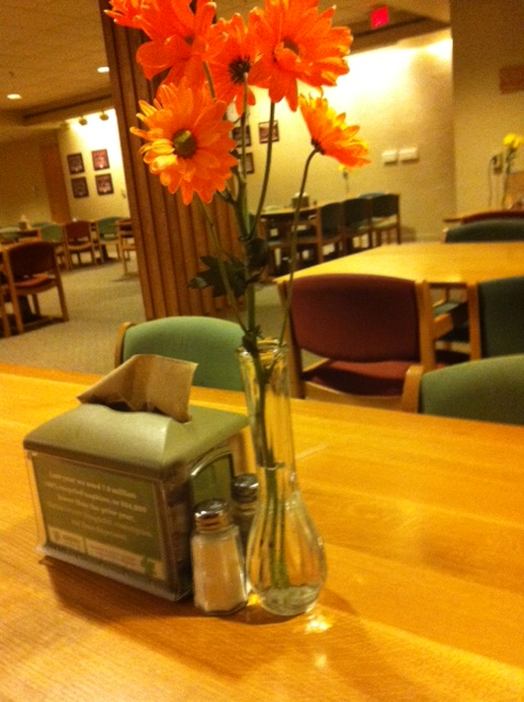 Glass Vase